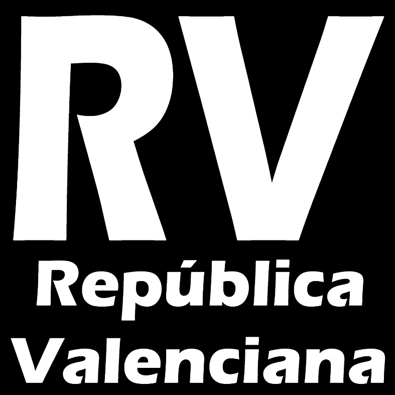 RV República Valenciana